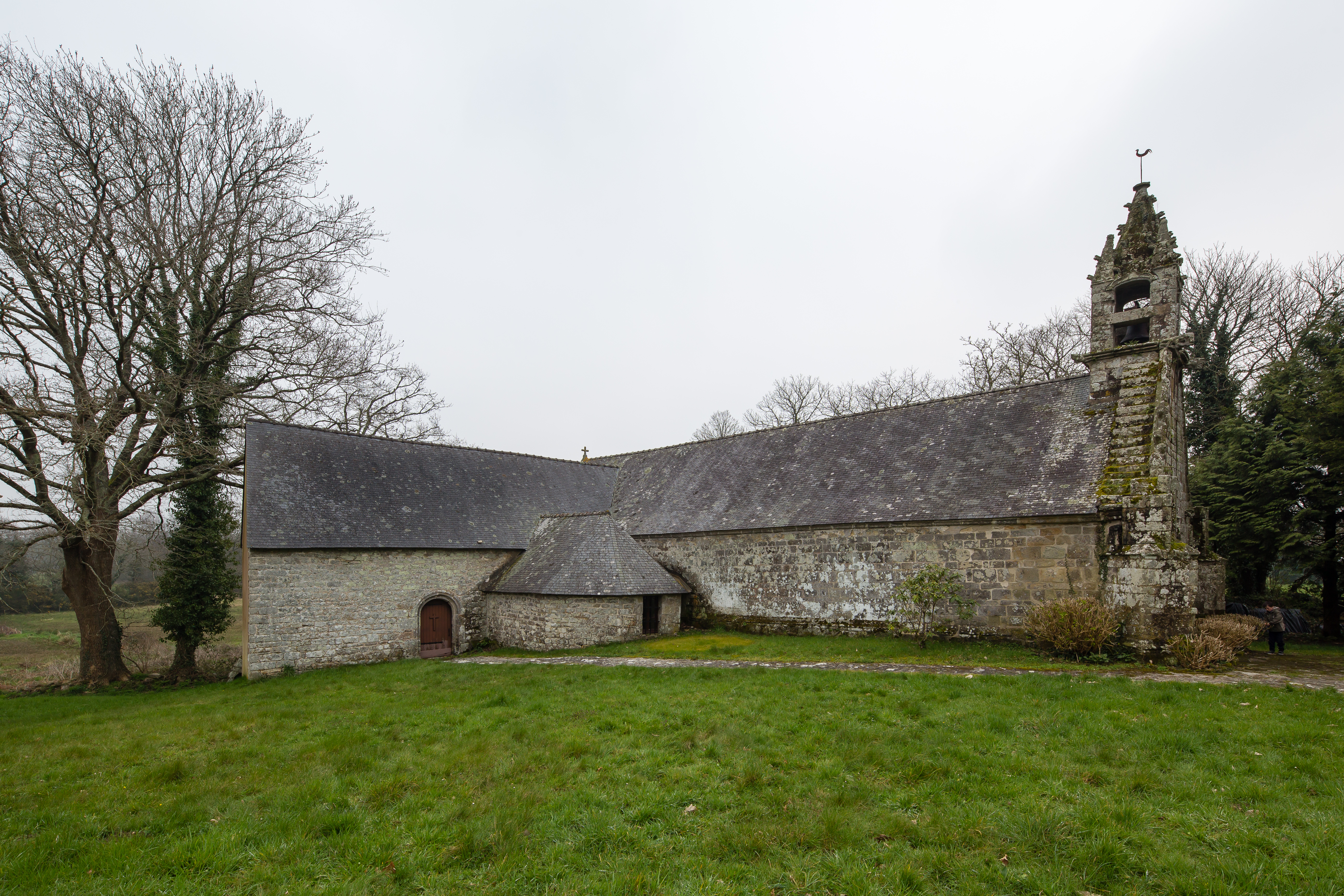 Vue ouest de la chapelle Notre-Dame-de-la-Clarté à Kervignac (France)